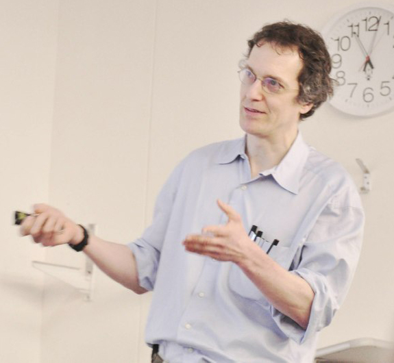 Gregory Moore, during the December 2012 Oxford conference *ASPECTS of Topology*